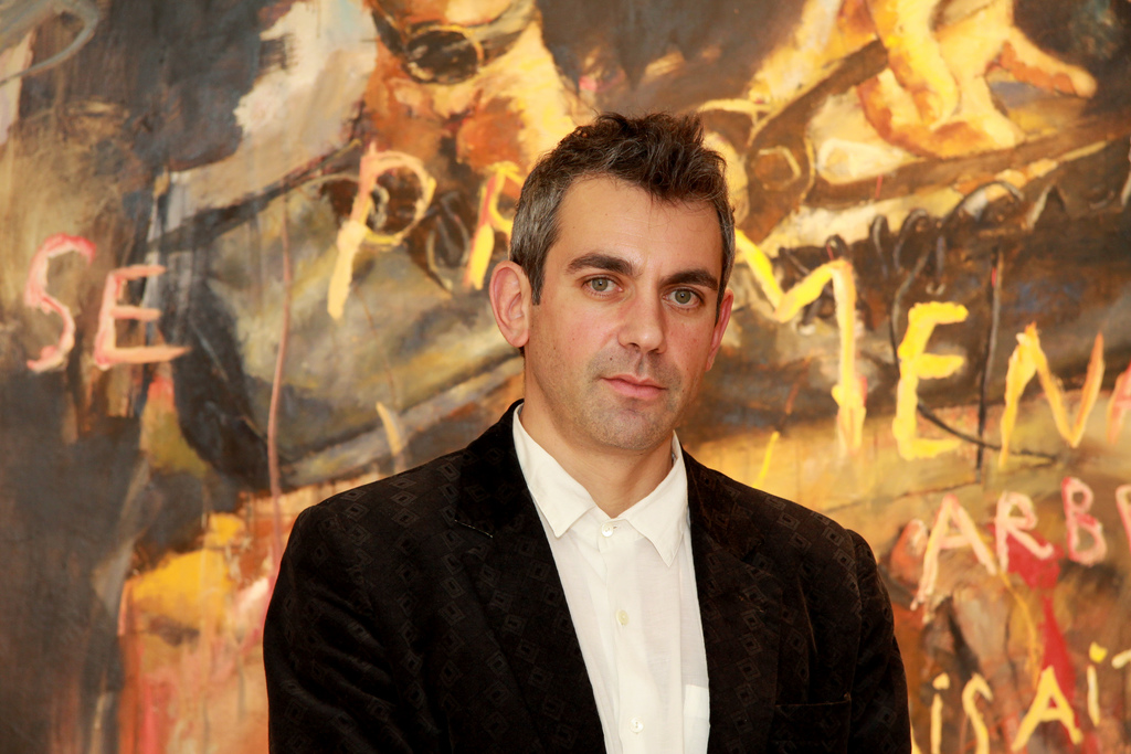 Der russisch-deutsche Schriftsteller Wladimir Kaminer.